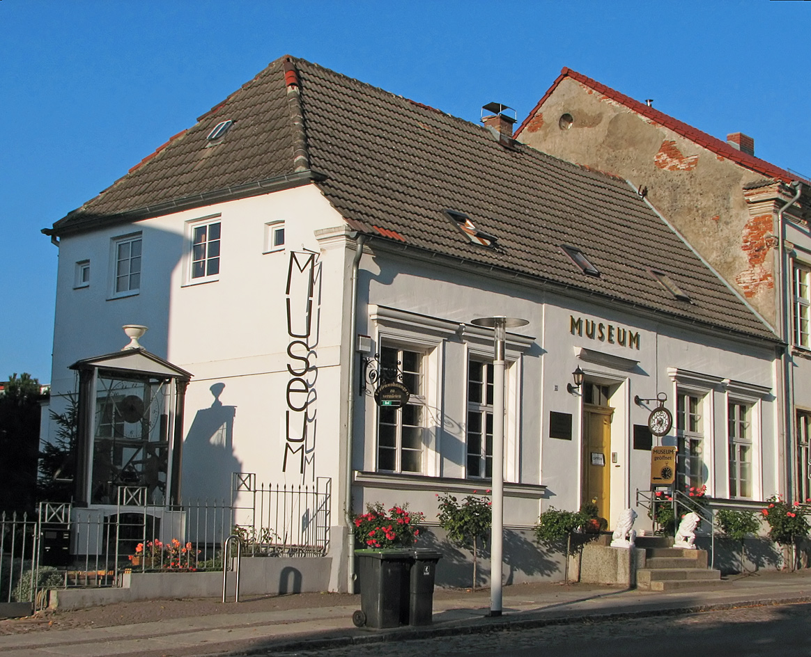 Beschreibung: Das Uhrenmuseum von Putbus. Fotograf: Darkone, 12. Oktober 2005